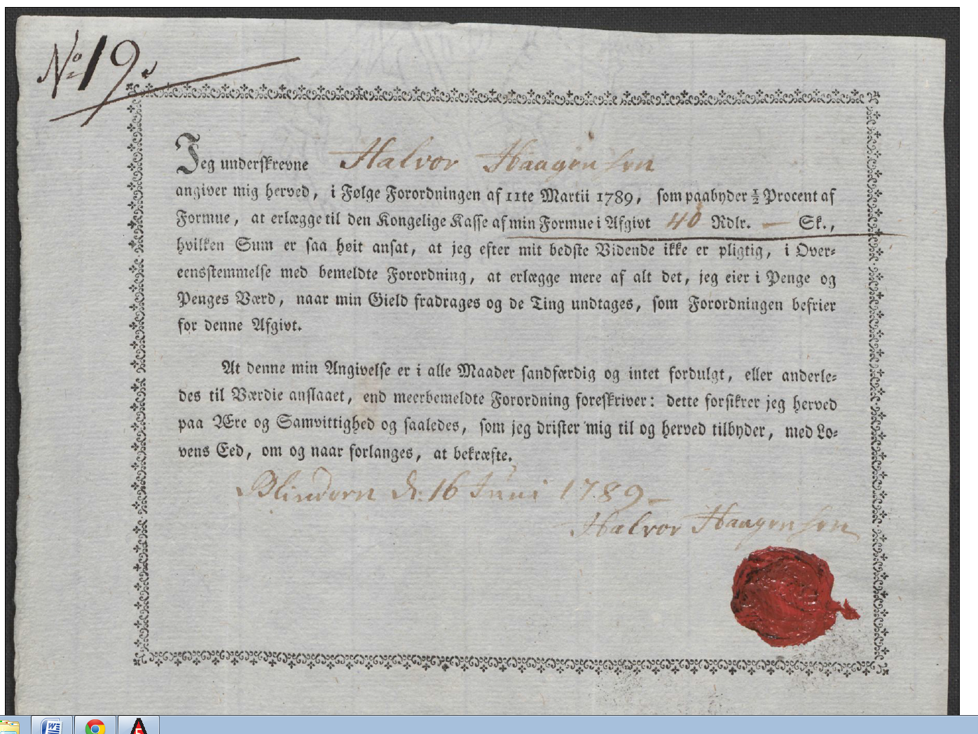 Halvor Blinderns selvangivelse i forbindelse med Formueskatten 1789